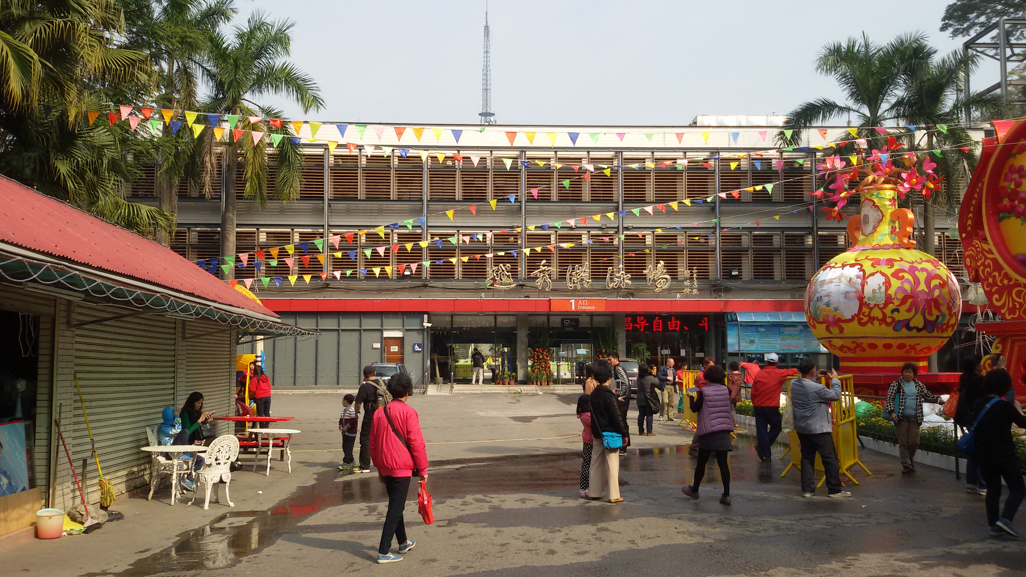 粵語: 越秀山泳场嘅大门